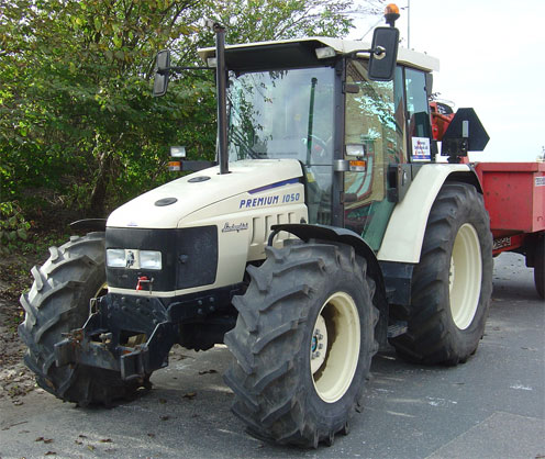 Lamborghini-Traktor Premium 1050